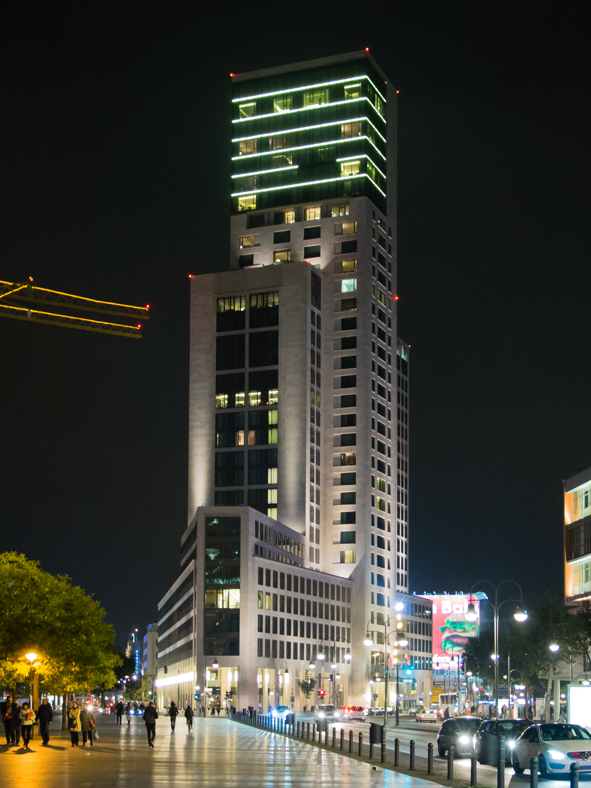 Zoofenster vom Breitscheidplatz aus bei Nacht